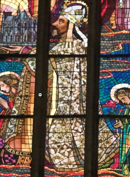 Vitráž